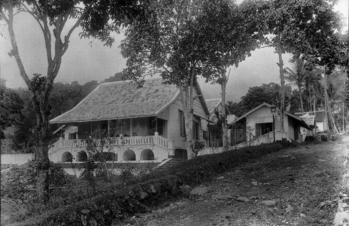 Foto. Het Hotel te Prigen aan de voet van de vulkaan Ardjoeno.